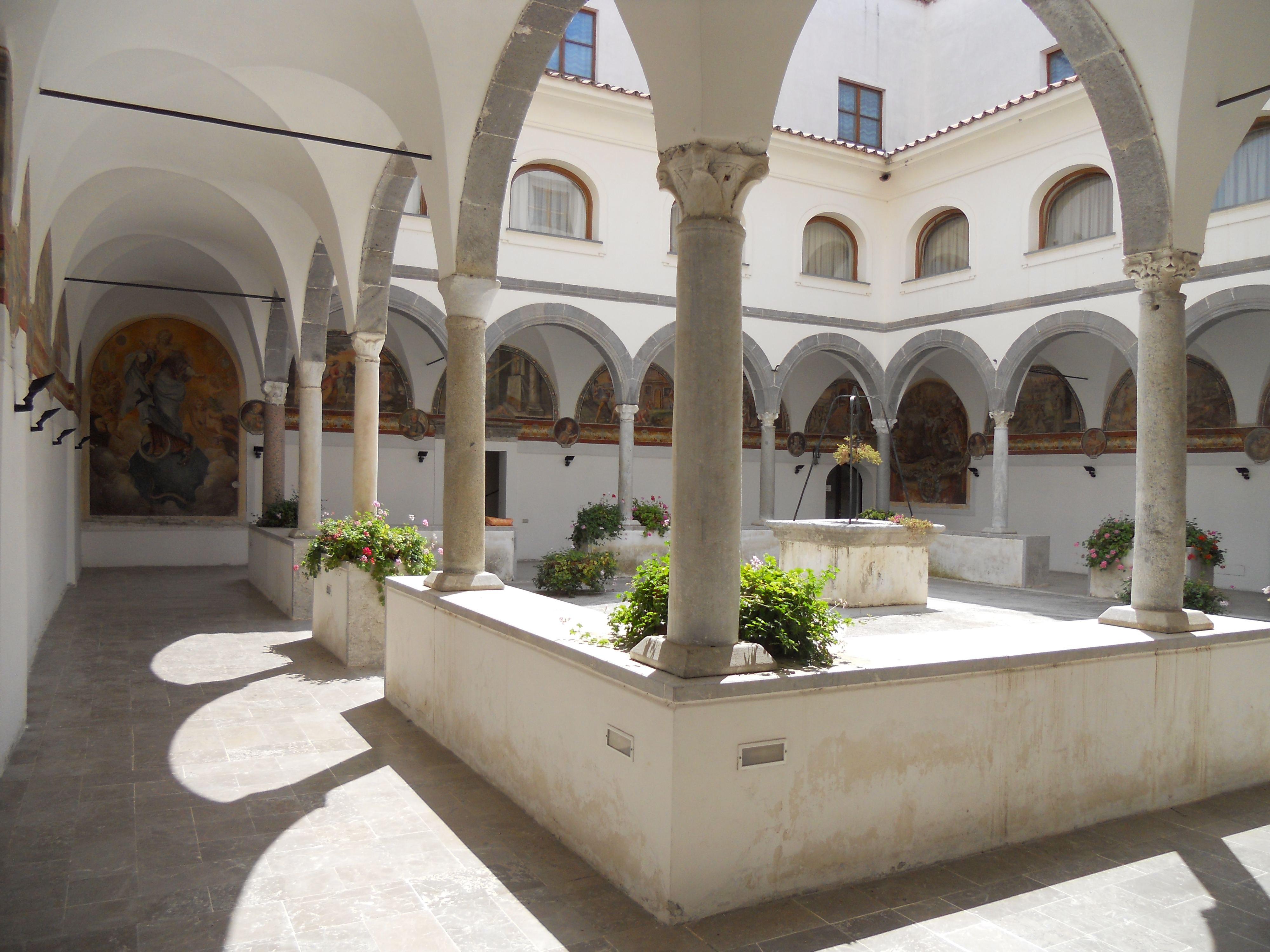 Chiostro quattrocentesco del Convento della SS. Trinità di Baronissi